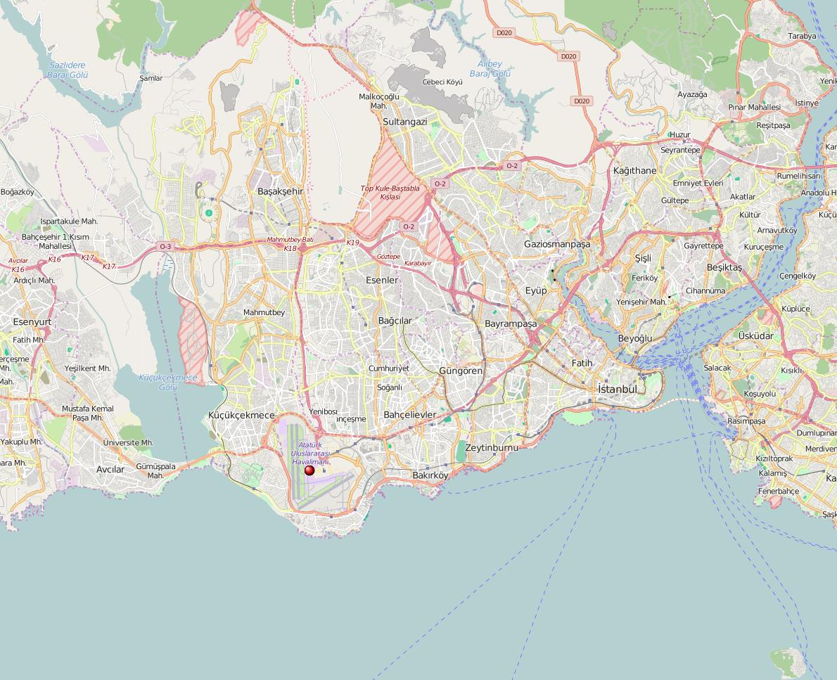 Ubicación atentados de Estambul de 28 de junio de 2016